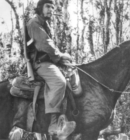 Ernesto Che Guevara on a mule in Las Villas, Cuba